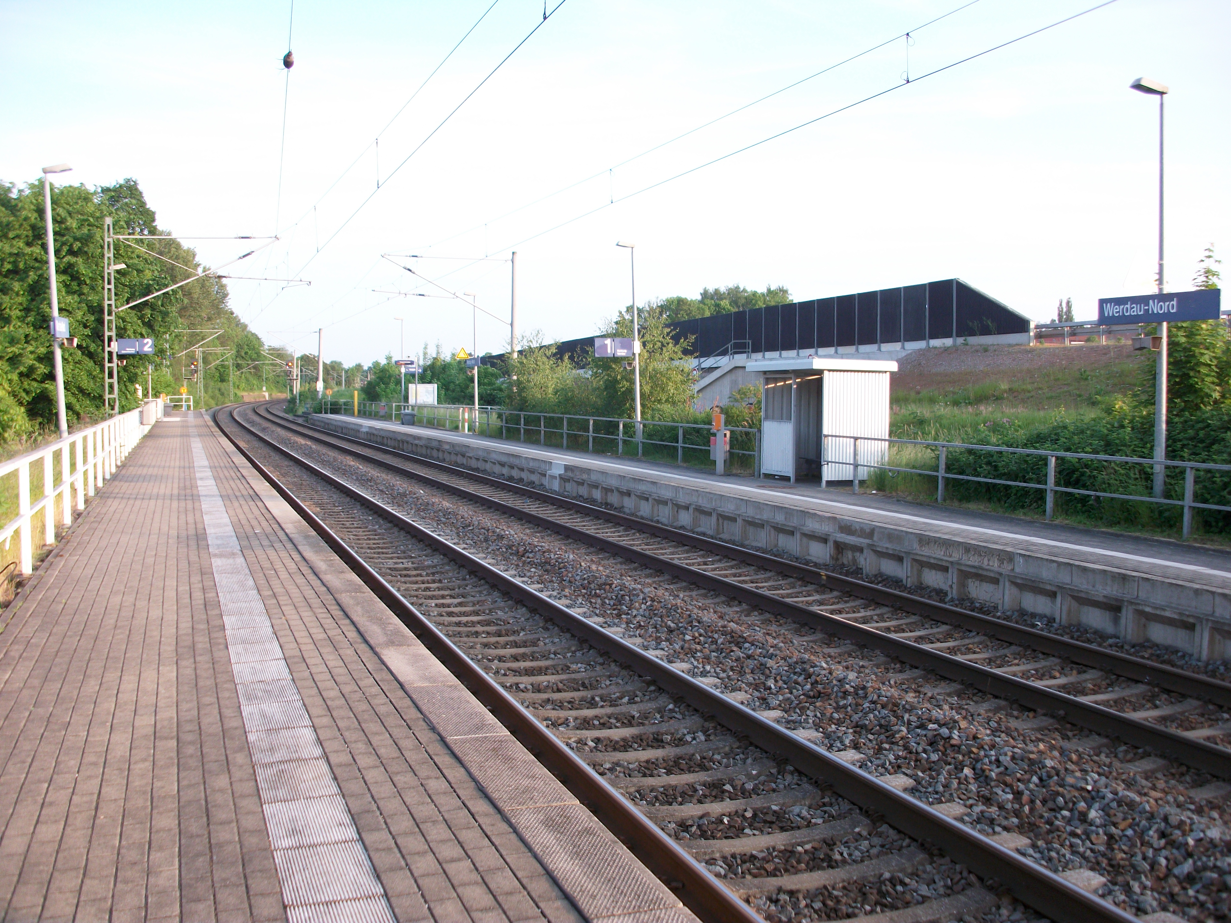 Haltepunkt Werdau Nord (2016)